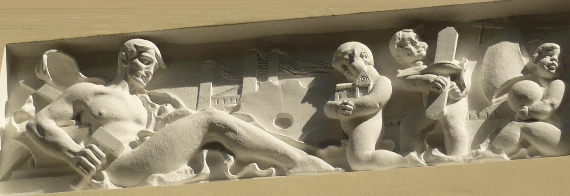 Lwów. Płaskorzeźby na pawilonie w Parku Stryjskim